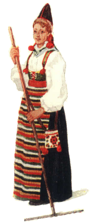 Folkdräkt från Rättviks socken (Dalarna)